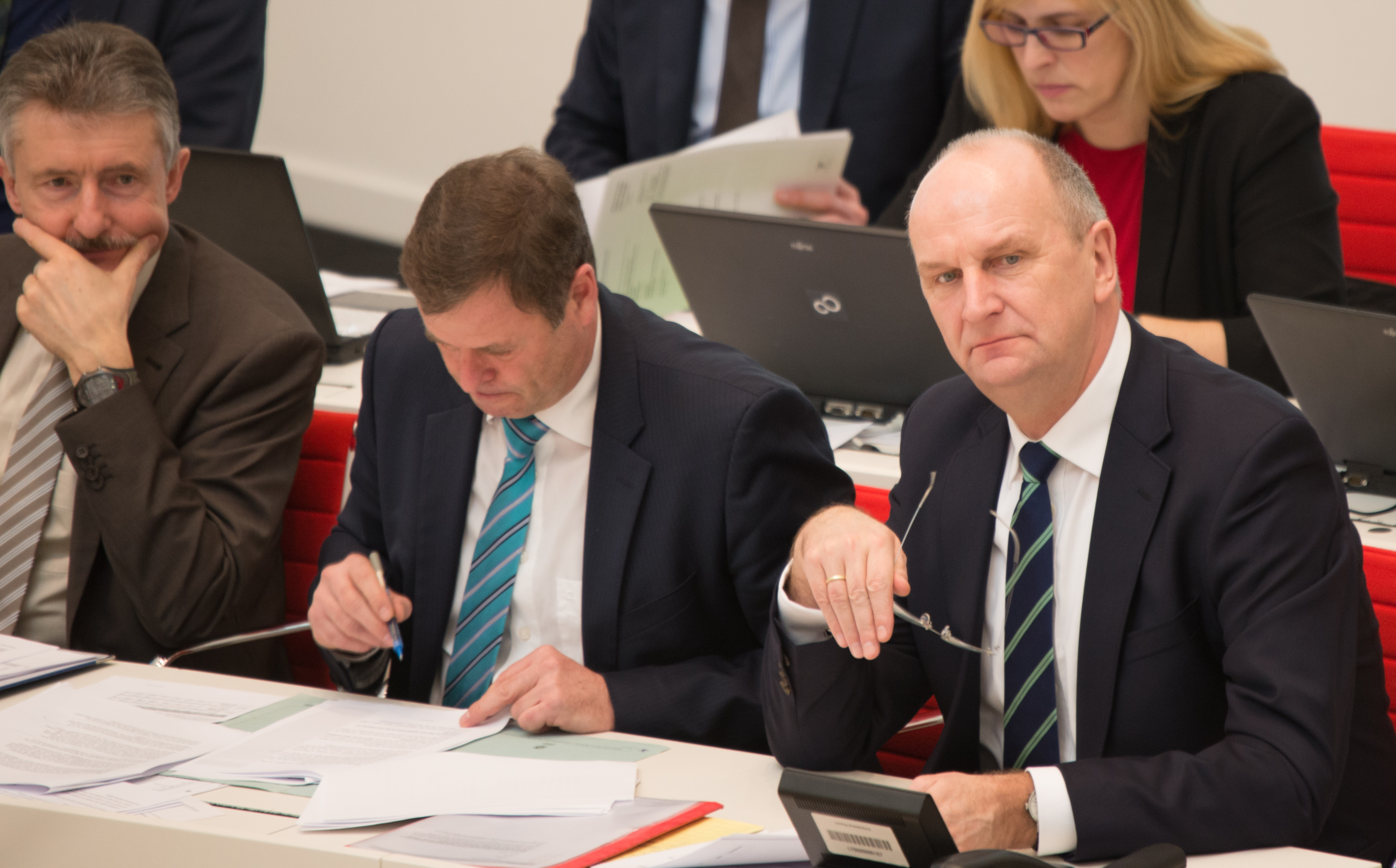 Impressionen aus der Plenarsitzung vom 9. März 2016 des Landtages Brandenburg